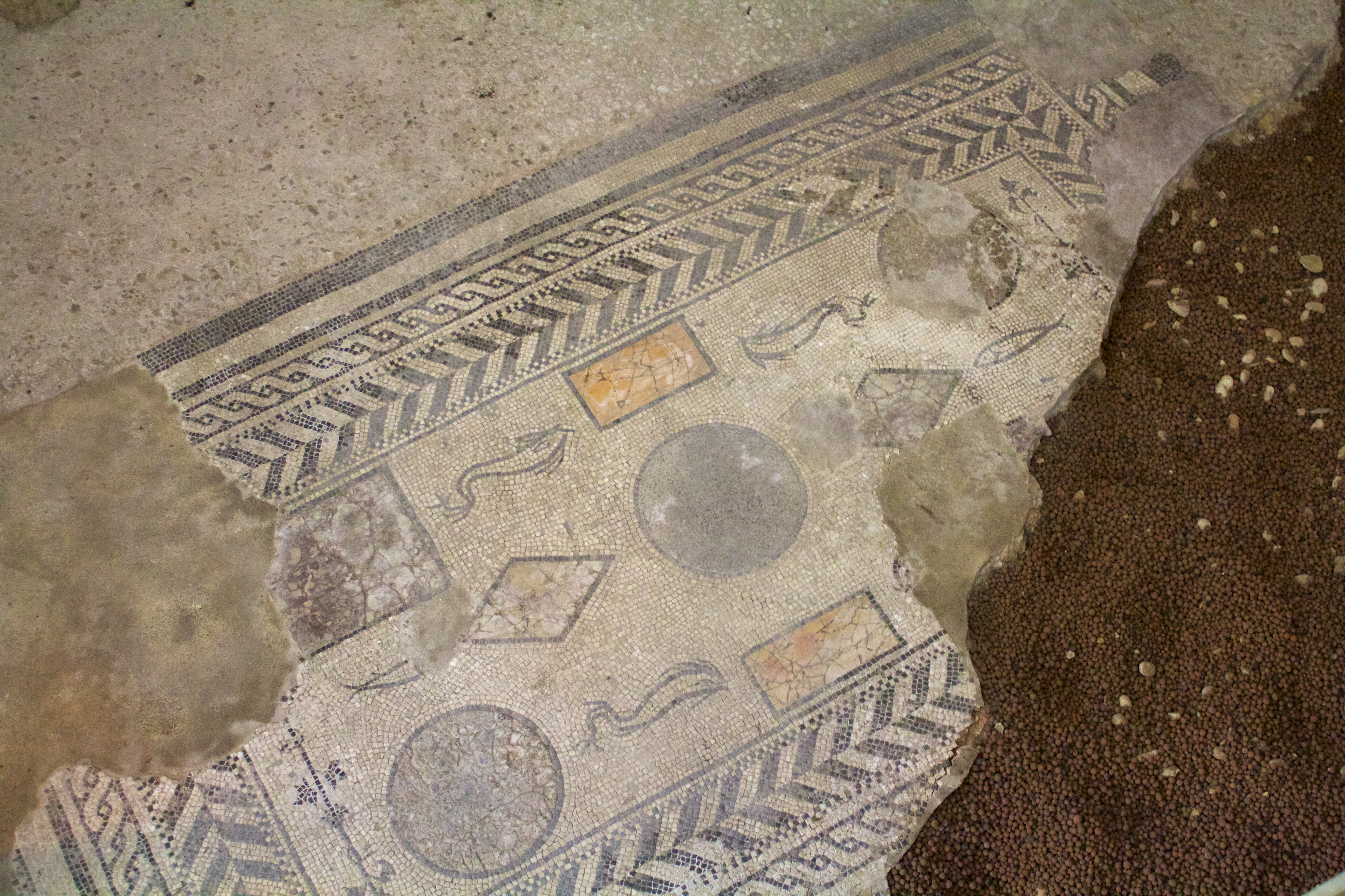 Mosaico della Domus Romana, Asti This is a photo of a monument which is part of cultural heritage of Italy.